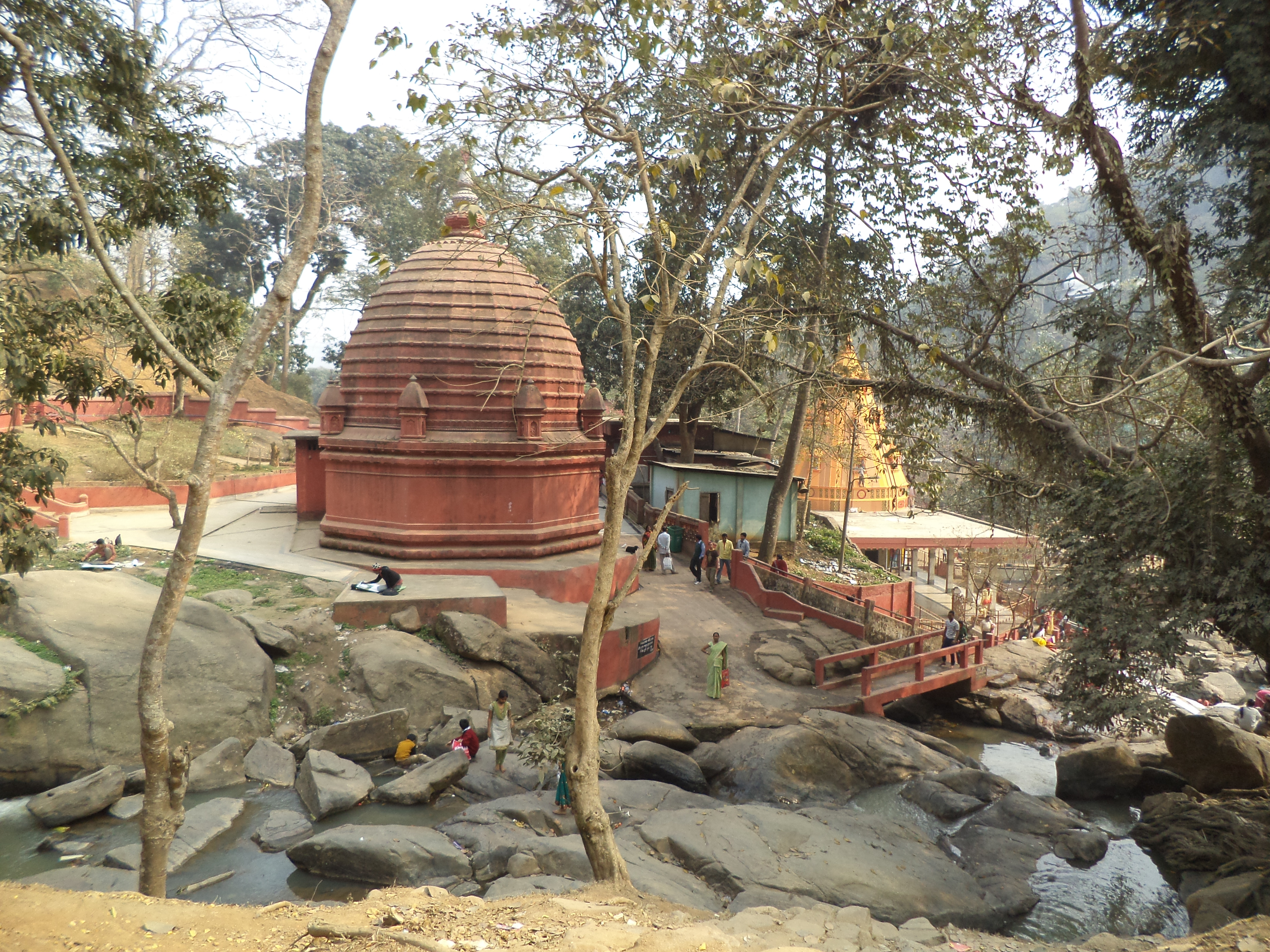 অসমীয়া: বশিষ্ঠ মুনিৰ আশ্ৰম হিচাবে জনাজাত এই মন্দিৰটোক "বশিষ্ঠ মন্দিৰ" বুলি জনা যায়... এই মন্দিৰ গুৱাহাটীত অৱস্থিত..